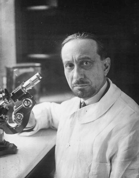 Professeur Roussy, Ecole de médecine (photographie de presse)